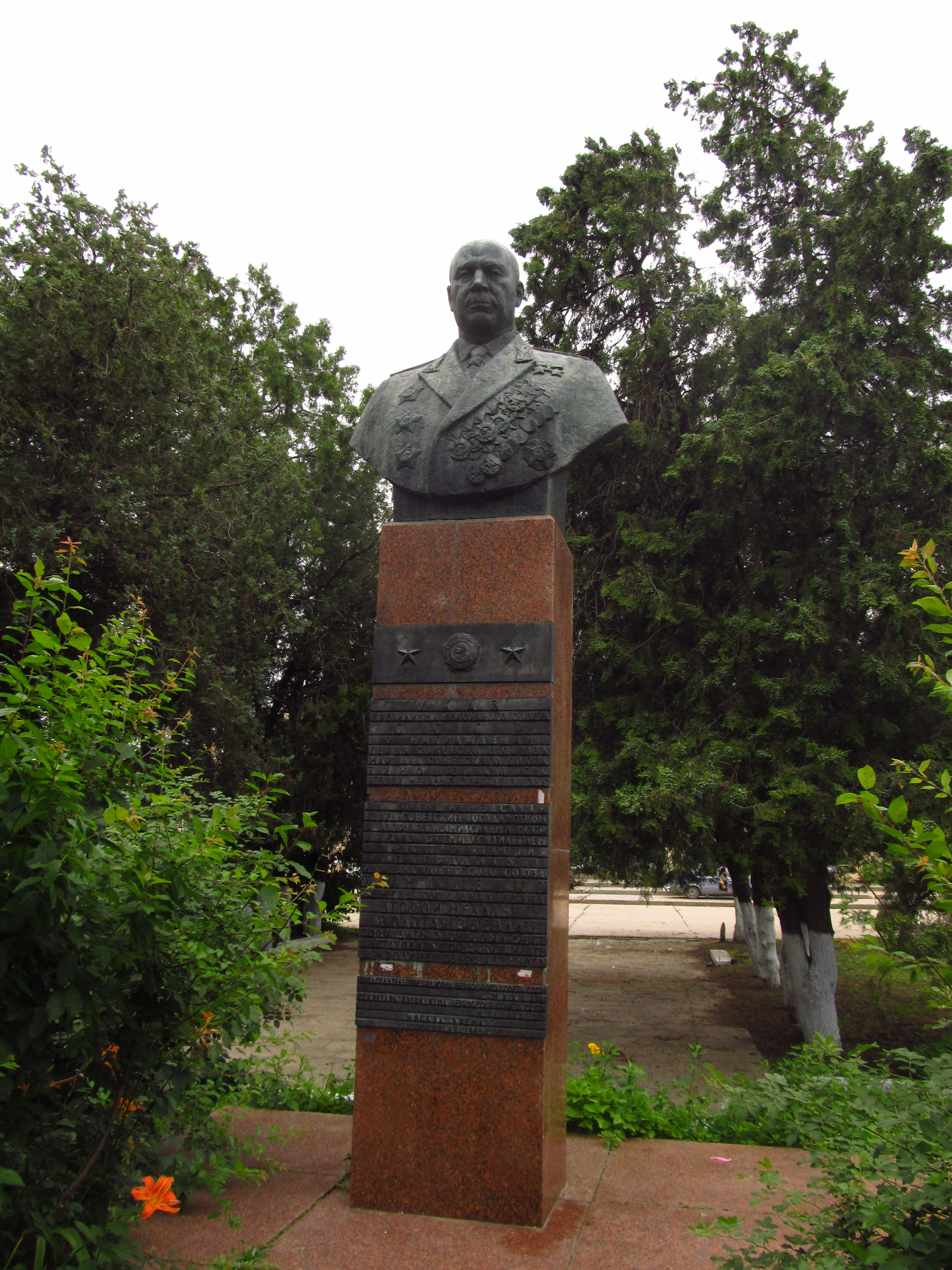 Пам’ятник Двічі Герою Радянського Союзу Тимошенку С.К. встановлений в рідному селі Фурманівка Кілійського району Одеської області